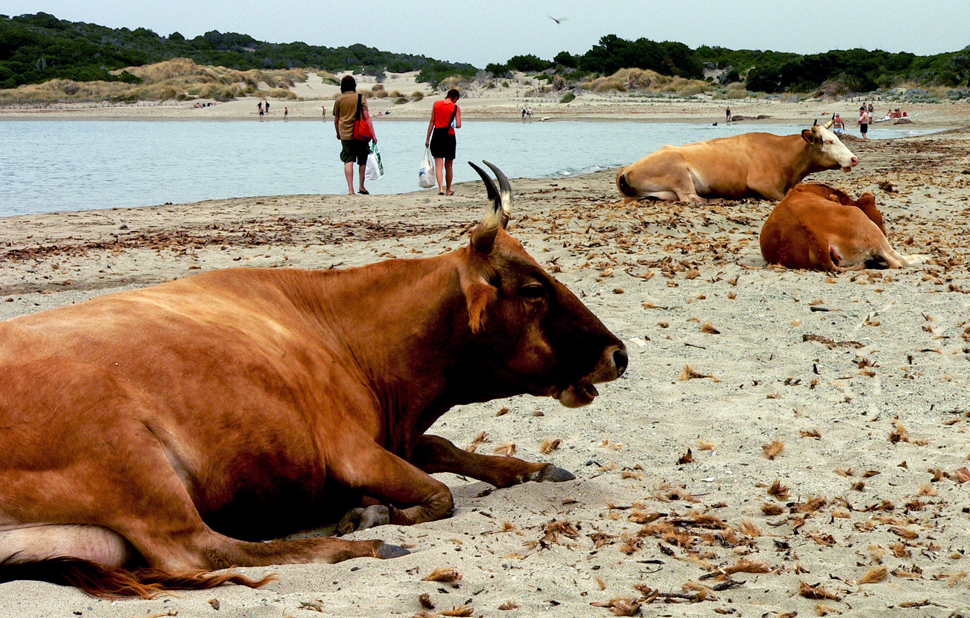 Barcaggio (Haute-Corse, France)